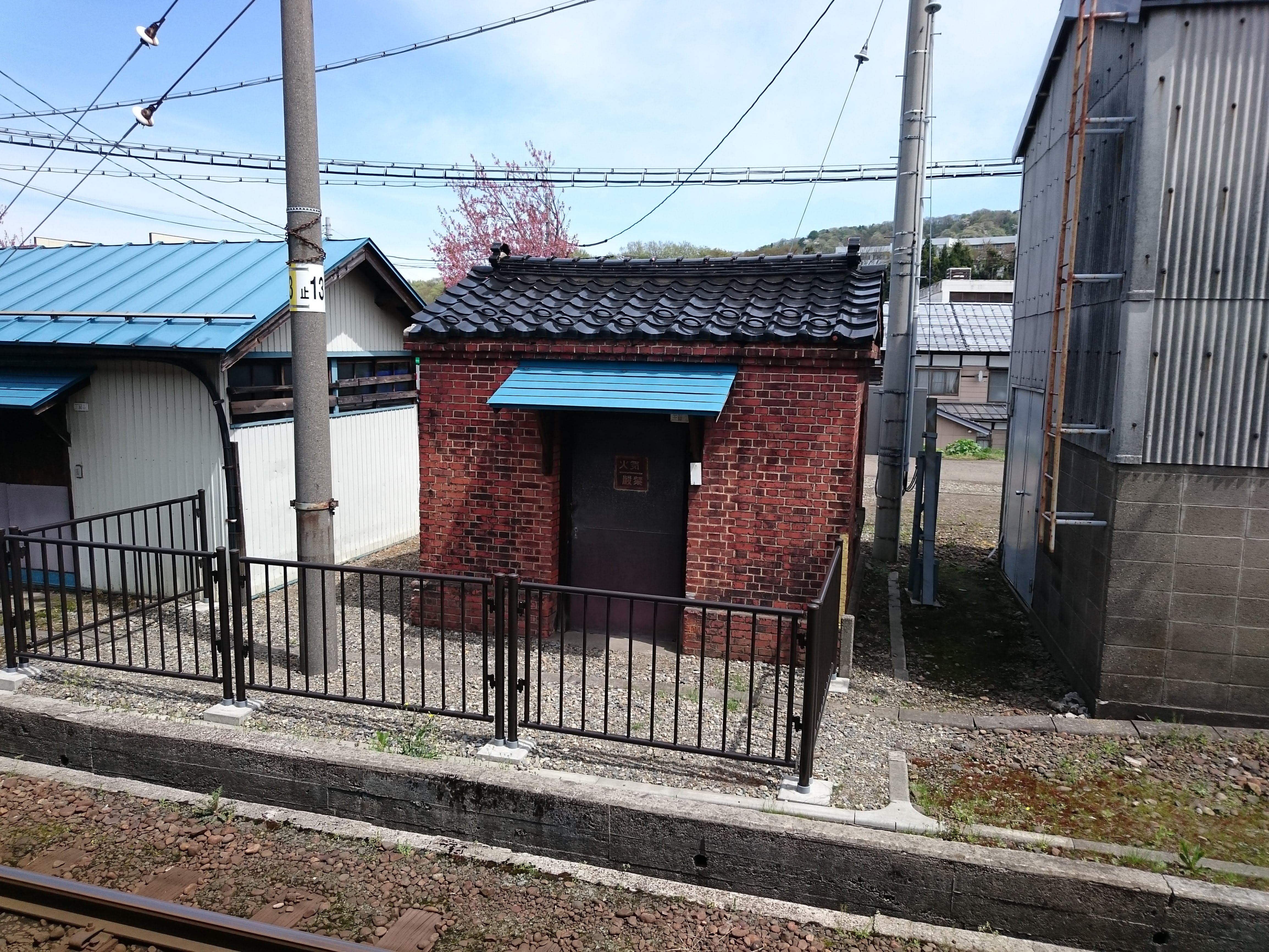 二本木駅のレンガ倉庫